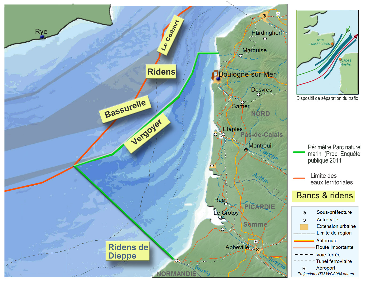 Variante moyenne du Périmètre (en vert) du projet de « Parc naturel marin des estuaires picards et de la mer d'Opale » ou plus précisément « Parc naturel marin à l’ouvert des estuaires picards et en mer d’Opale » (initialement nommé "Parc naturel marin des Trois Estuaires" , qui a fait début 2008 l'objet du lancement d'une procédure d'étude et de création, et dont la variante ici représentée par le trait vert a été soumise à enquête publique en 2011. Le trait rouge délimite les eaux territoriales anglaises et françaises.